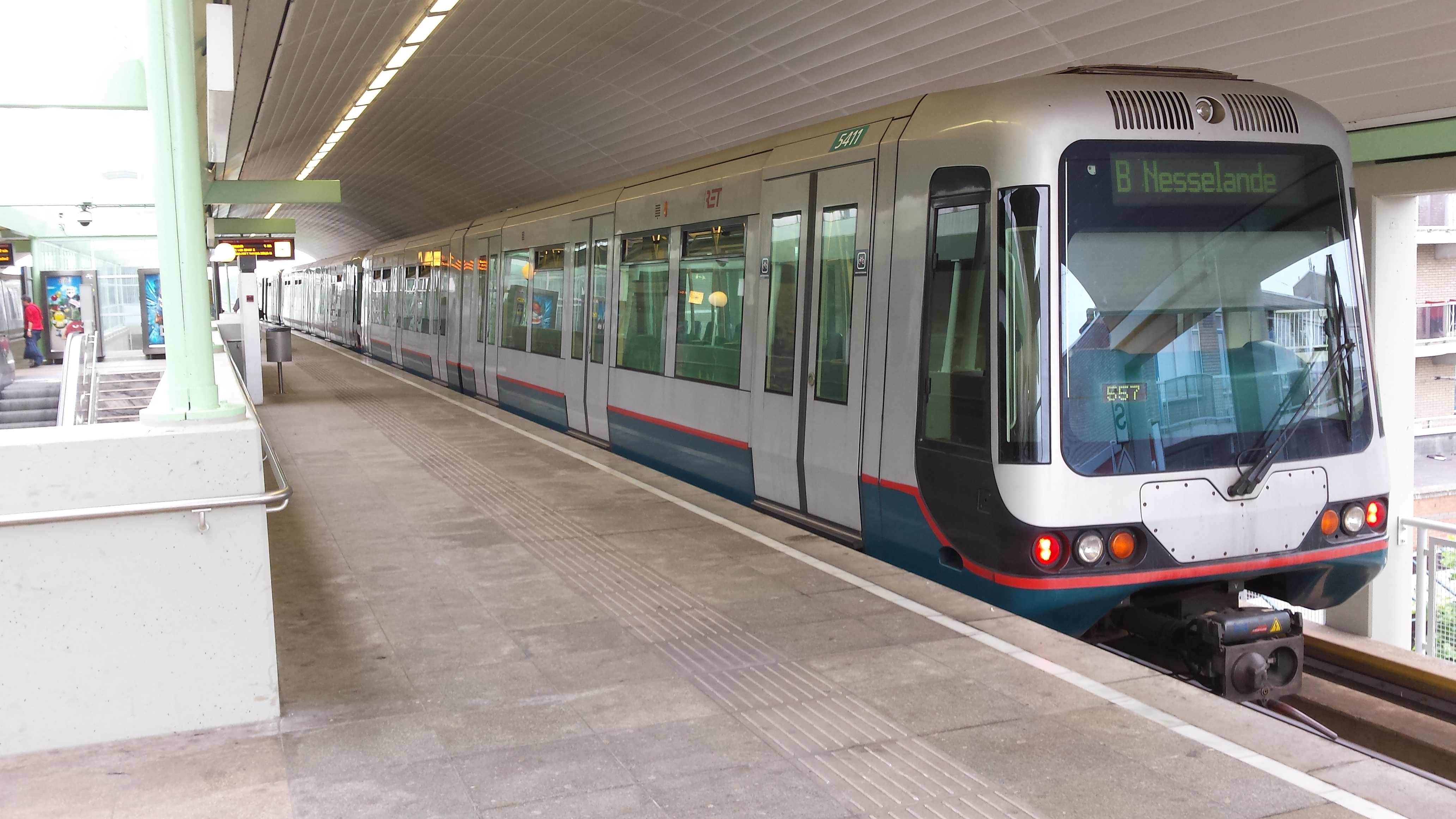 RET Metro Type SG2/1 op De Akkers op metrolijn B richting Nesselande.